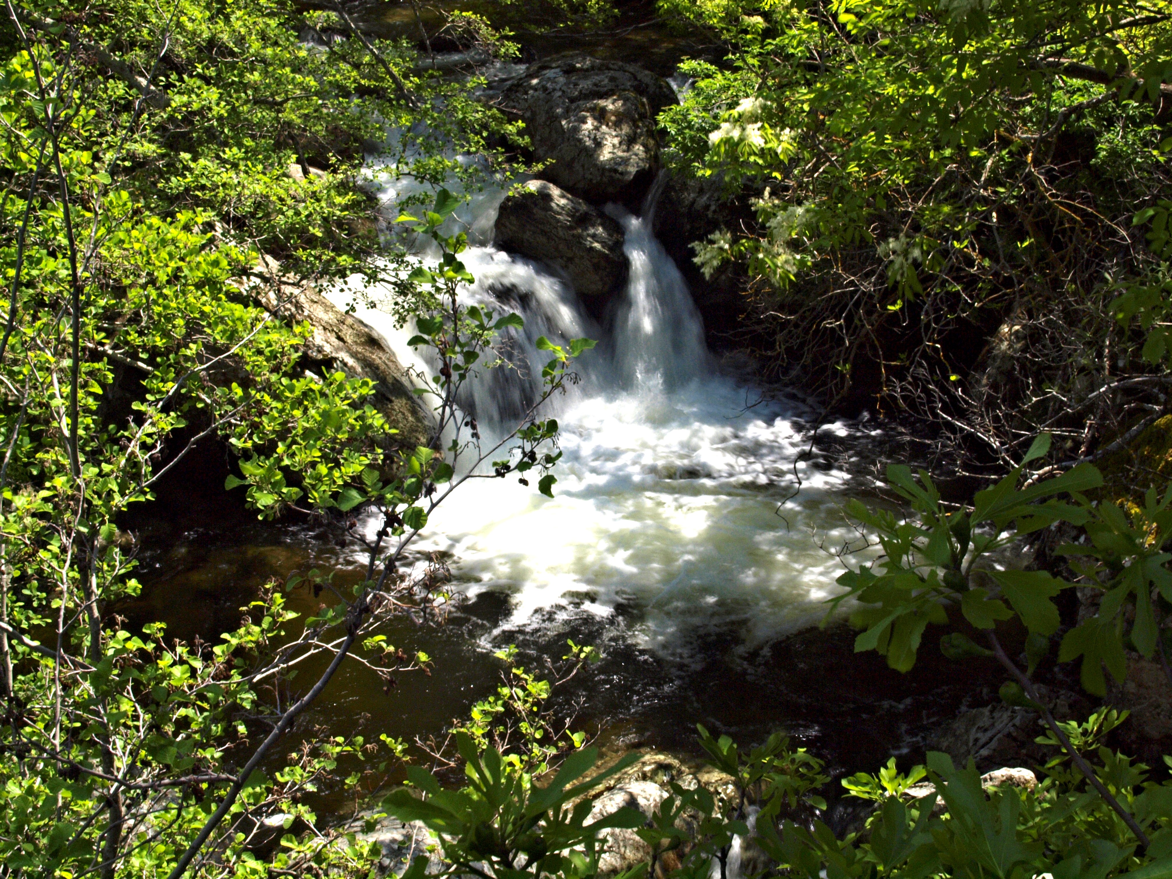 Ogliastro (Corsica) - Rivière d'Olcani en amont du pont de la D233